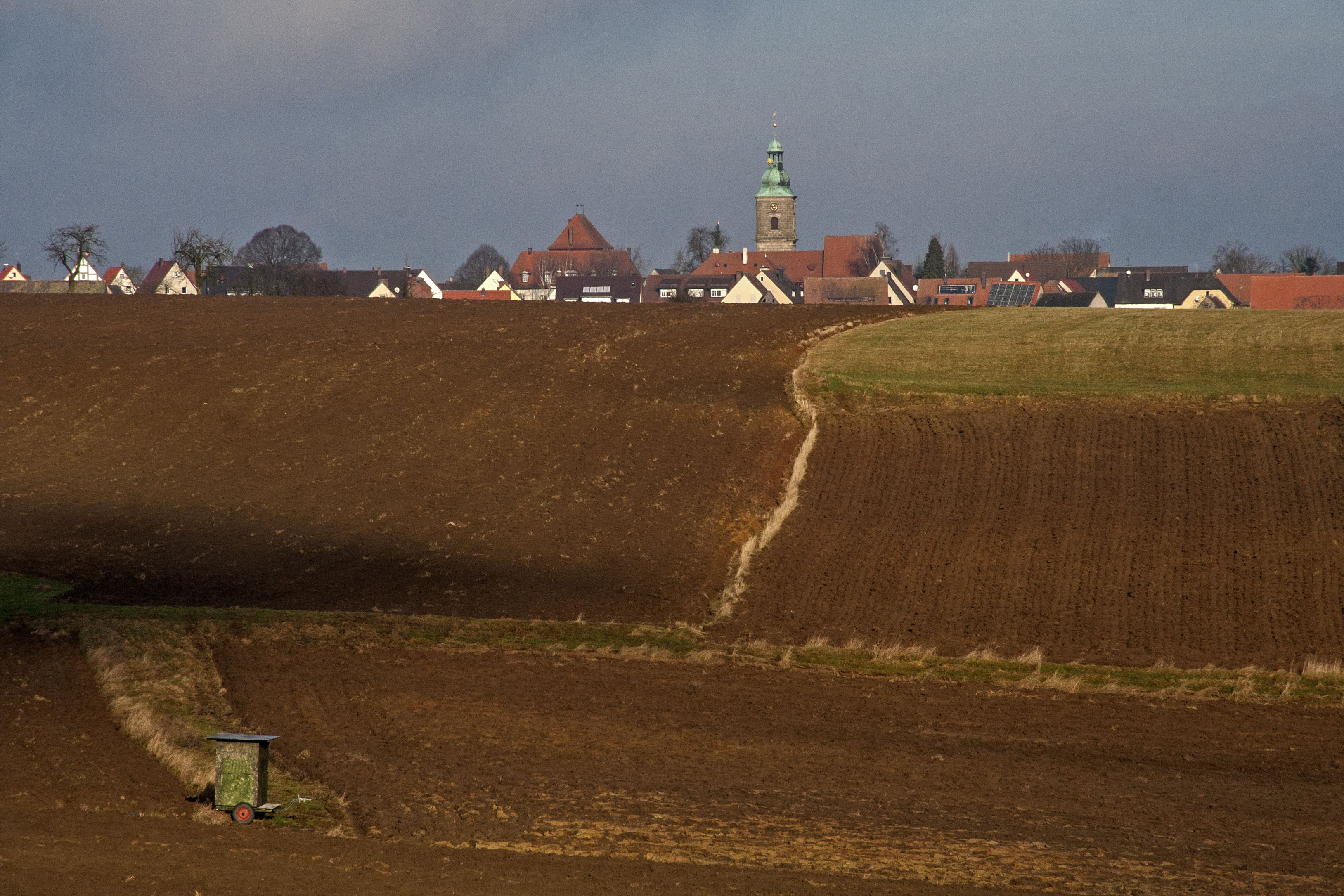 Kalchreuth, Ortsansicht